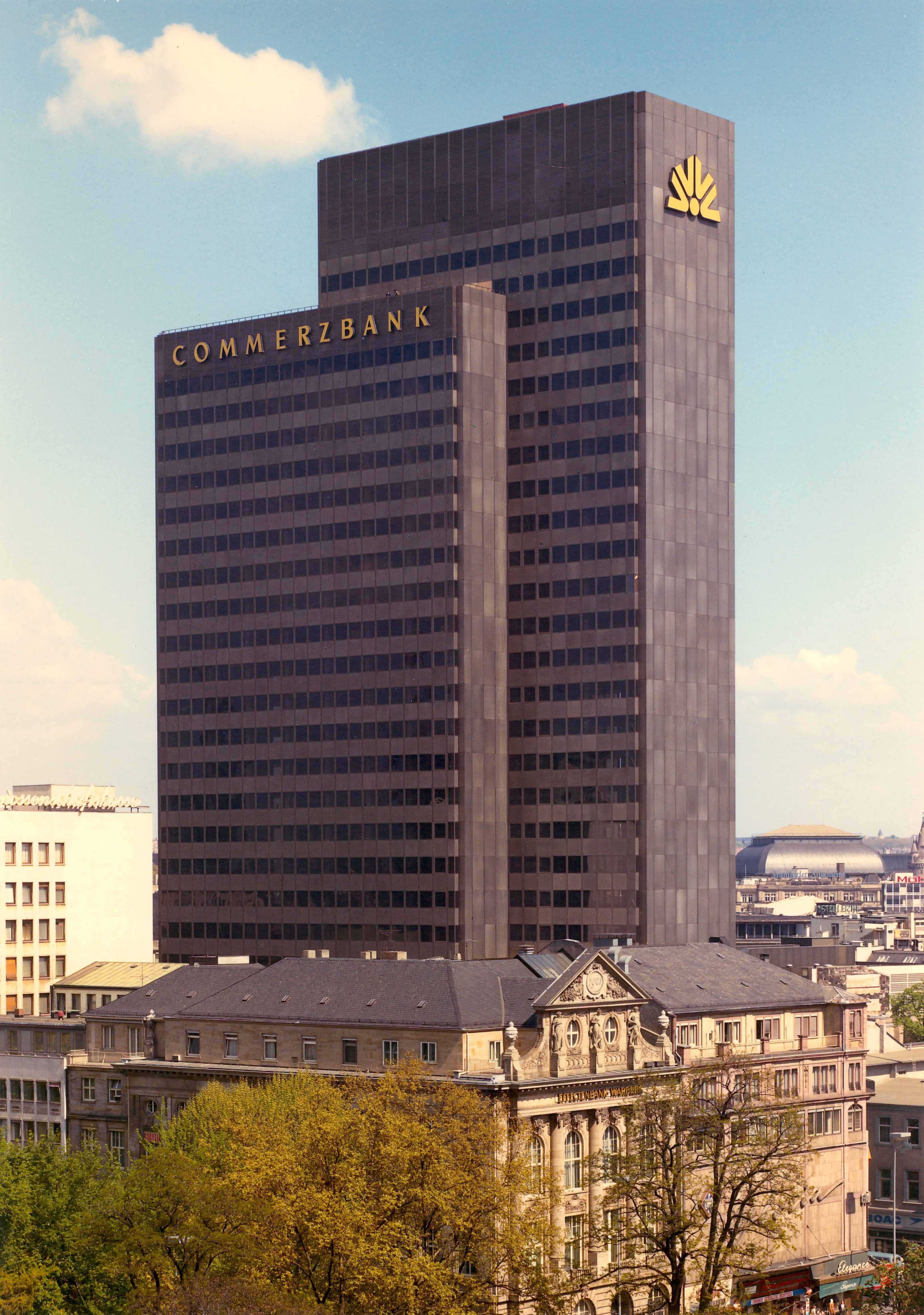 1974 Commerzbank altes Hochhaus